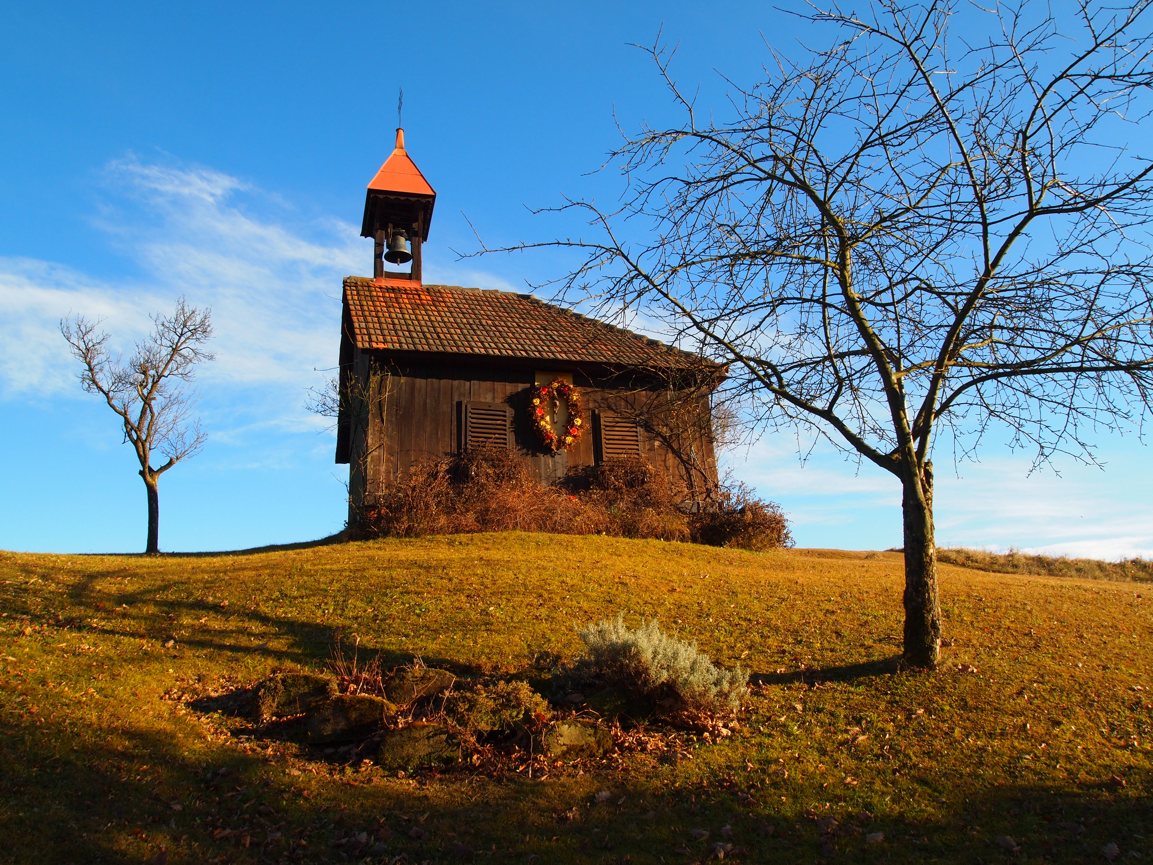 Wegkapelle der Ortschaft Oberdrosen/Sankt Martin an der Raab - Denkmalschutznr. Objekt-ID: 11643